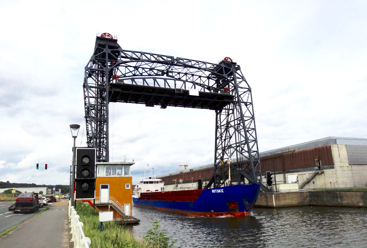 Budabrug in de haven van Brussel te Nederoverheembeek geopend voor een zeeschip